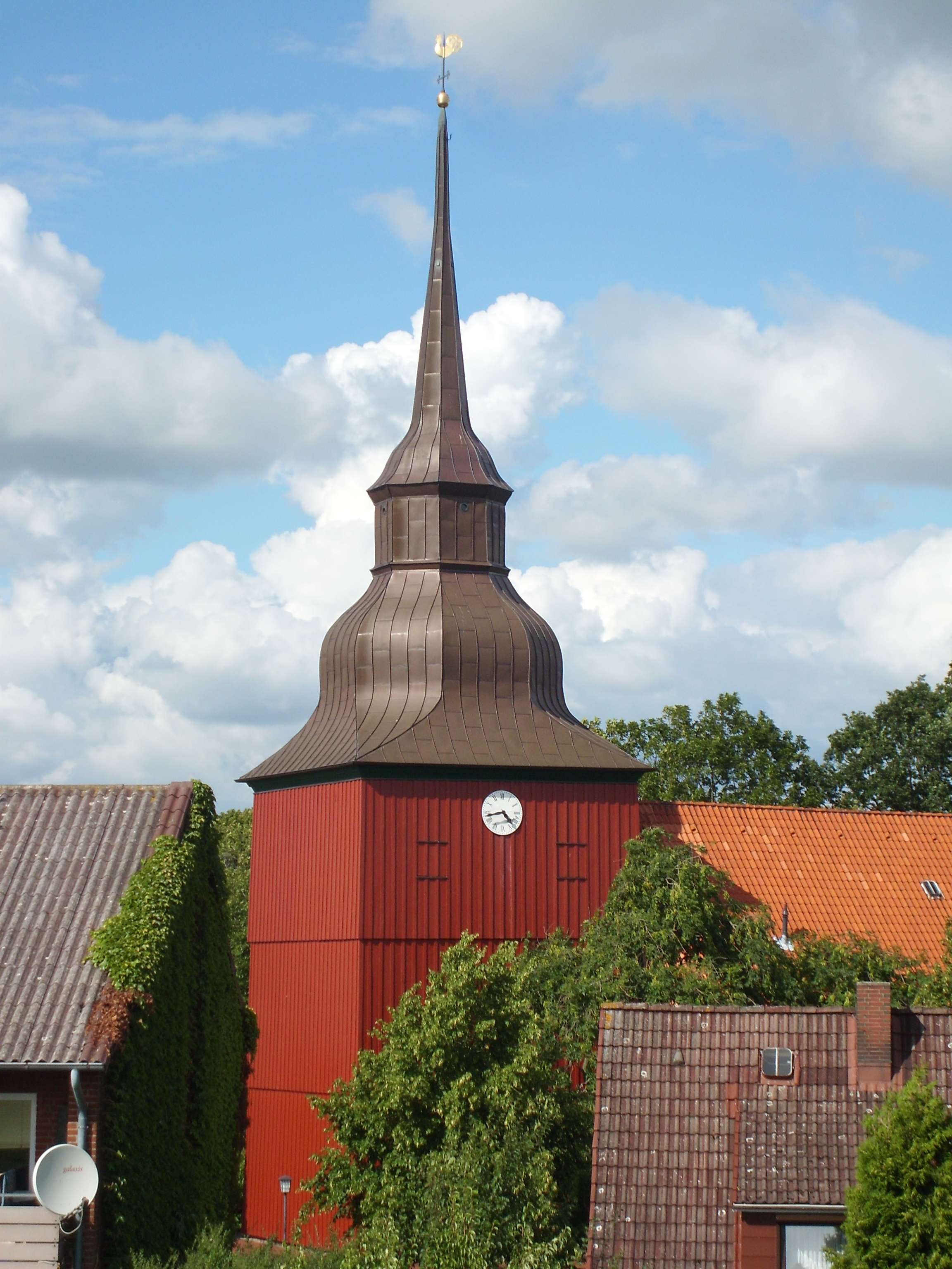 Der Turm der St. Nikolauskirche in Brokdorf vom Elbdeich aus gesehen